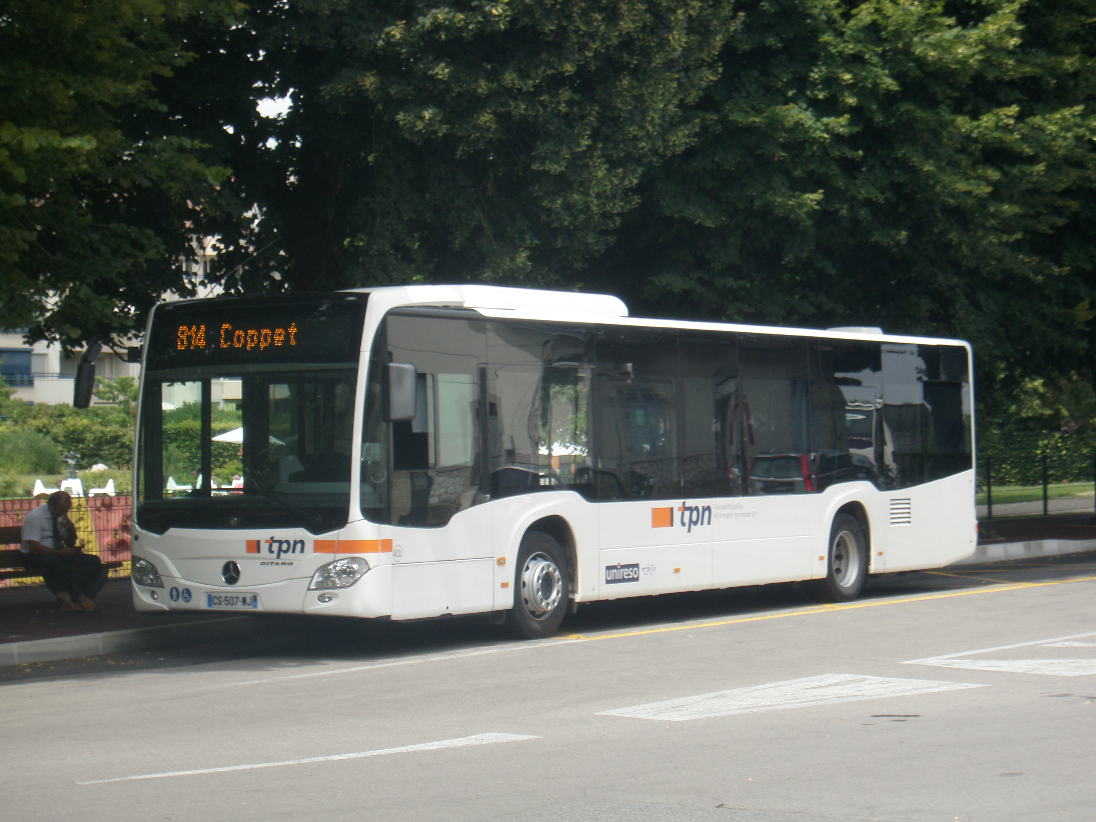 Mercedes-Benz Citaro der Transports publics régionaux Nyon ouest-Vaudois (TPN) an der Haltestelle Divonne-gare